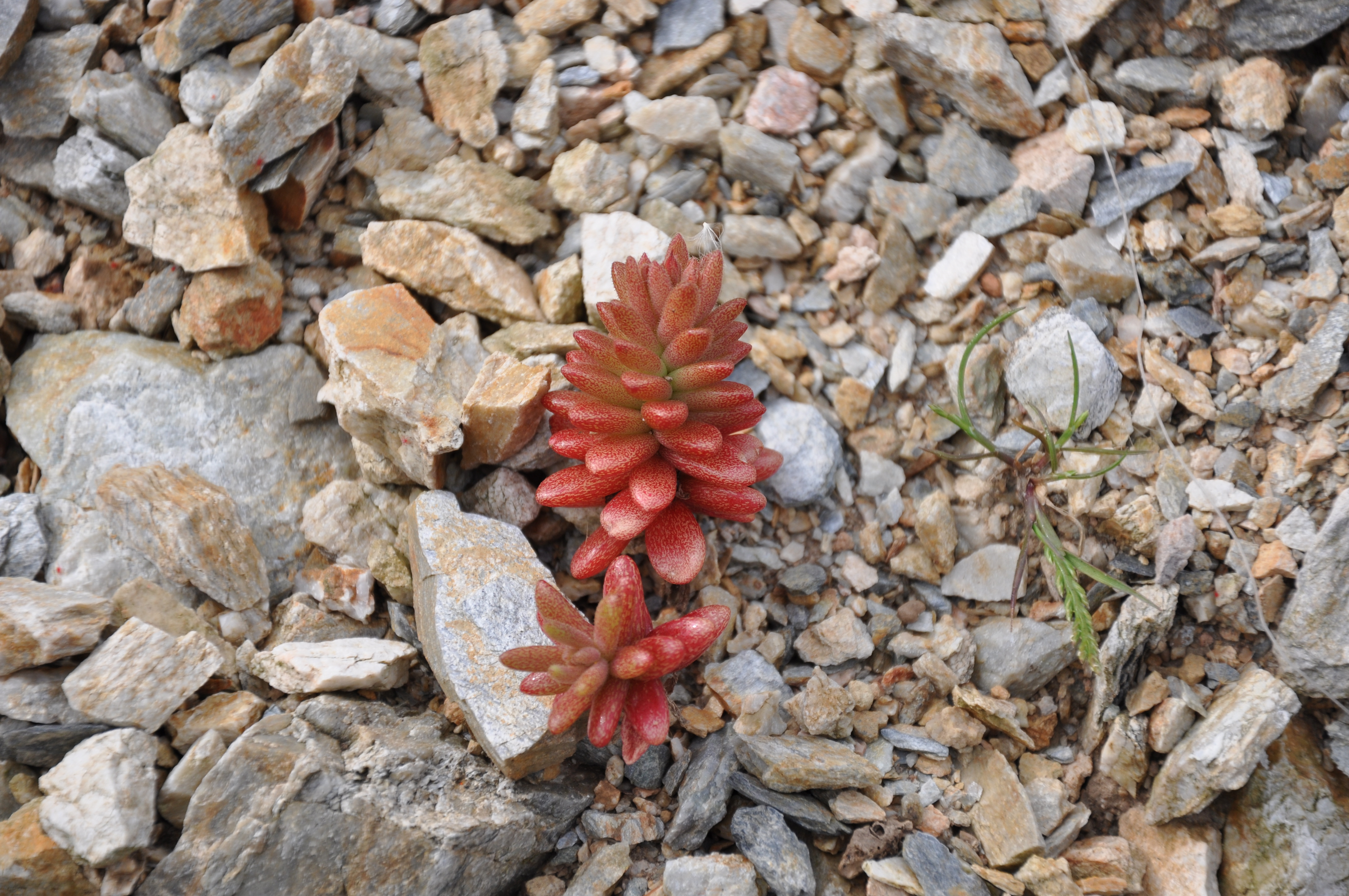 Uña de gato roja (Pistorinia hispanica) en Ceuta, España.